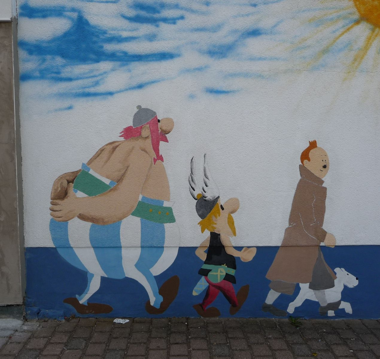 Obelix, Asterix, Tim und Struppi